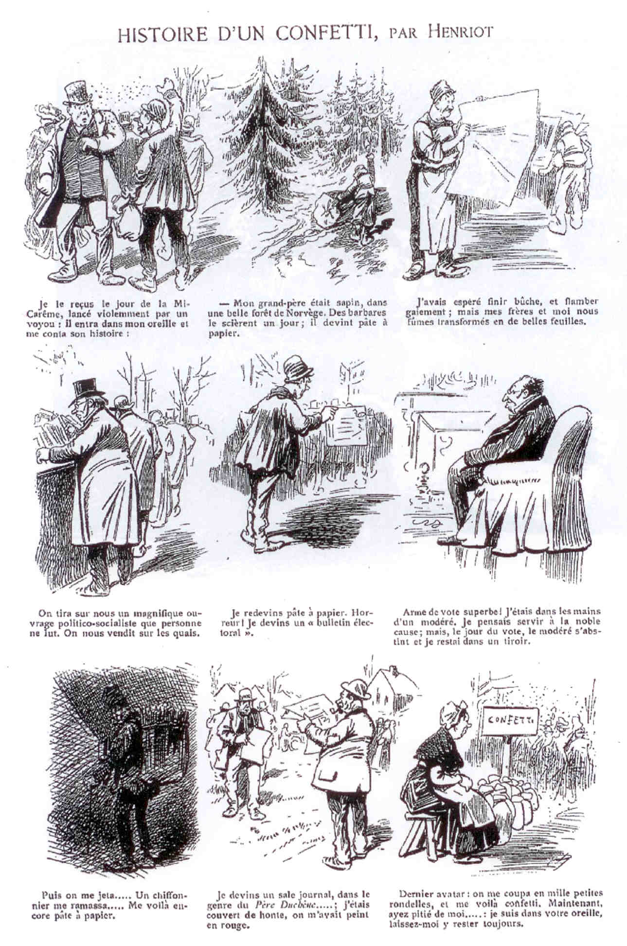 Dessins retraçant l'histoire d'un confetti.